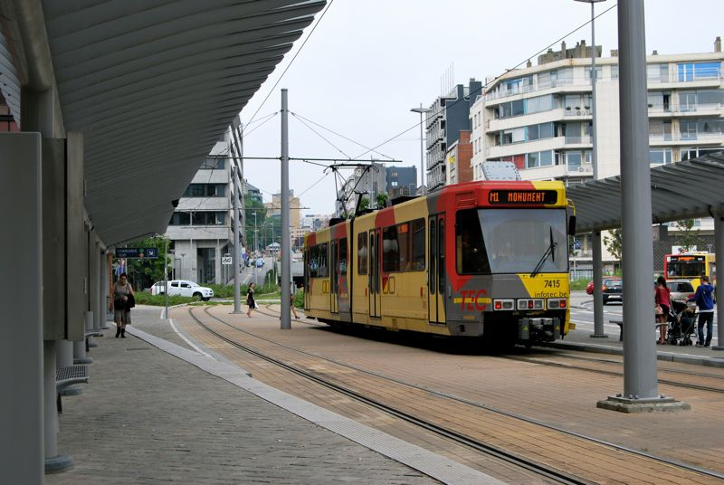 Rame de la ligne 1, à la station "Tirou".